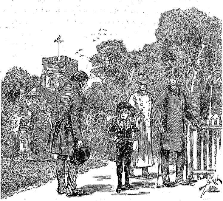 Illustration en page 123 de Le Petit Lord, [1], adapté de l'anglais par Eudoxie Dupuis Paris, C. Delagrave, 1888